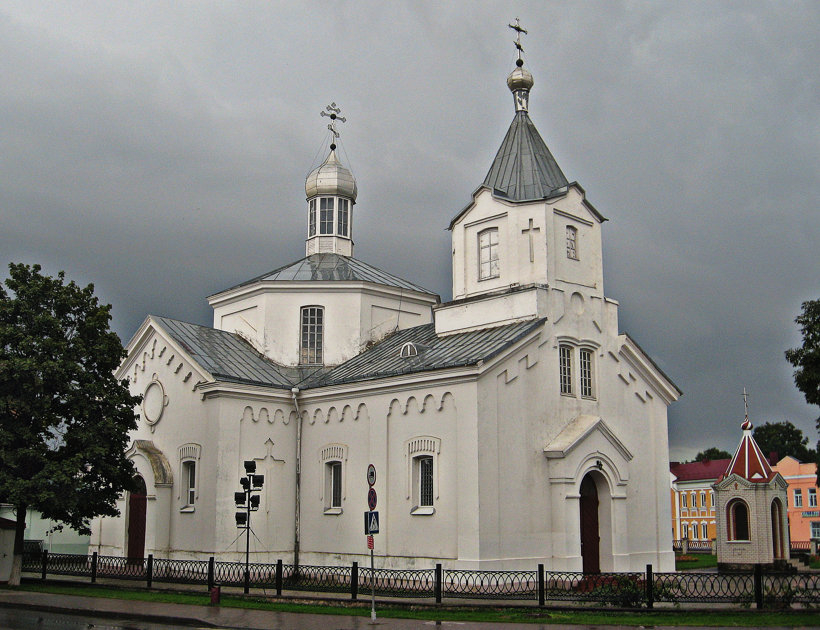 Правалаўная царква ў цэнры горада Ашмяны